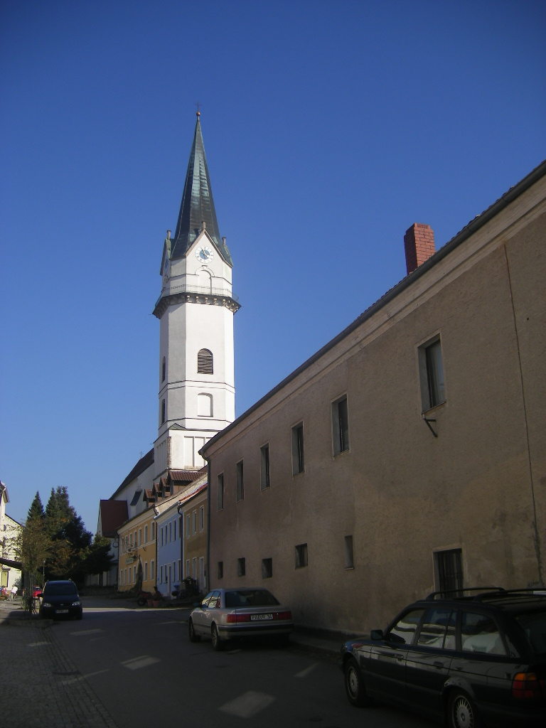 Hofkirchen